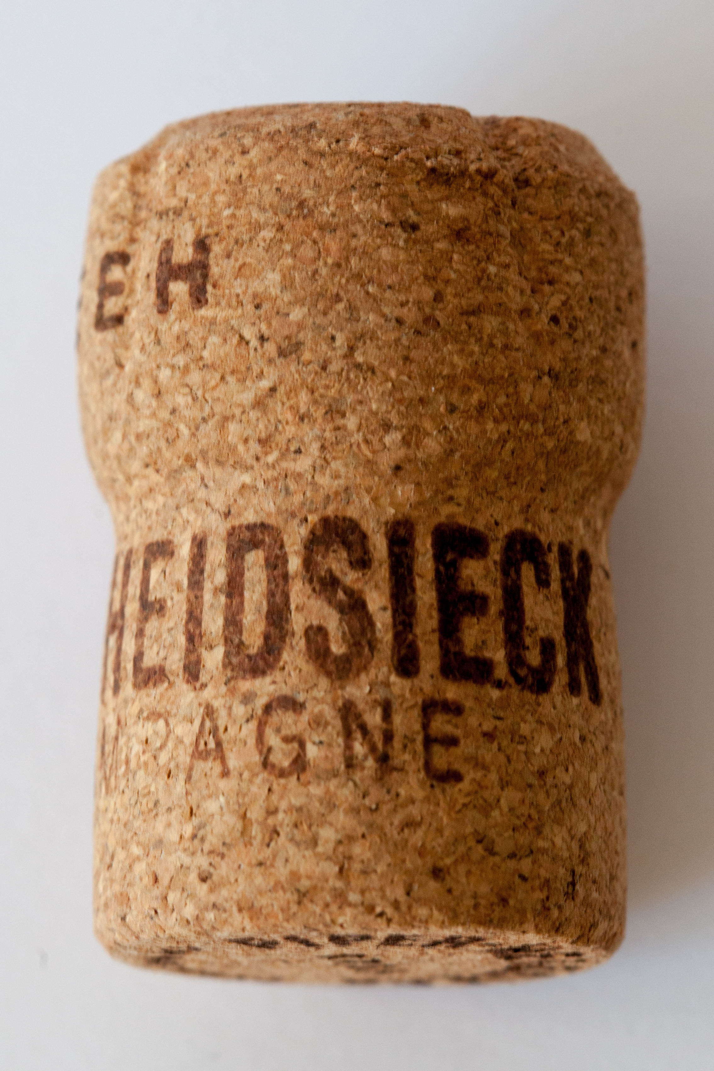 Korken für Champagnerflasche Piper-Heidsieck